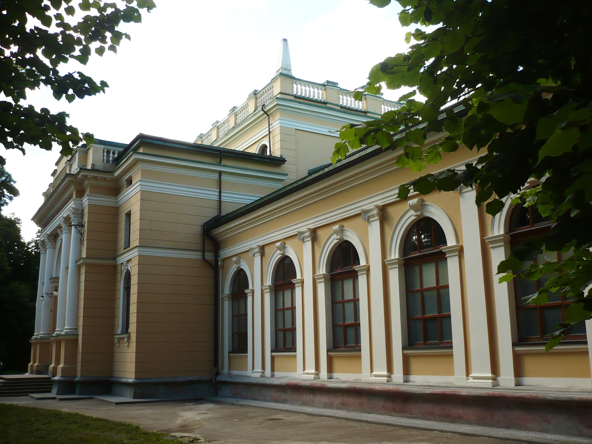 Lwów. Pałac Sztuki w Parku Stryjskim